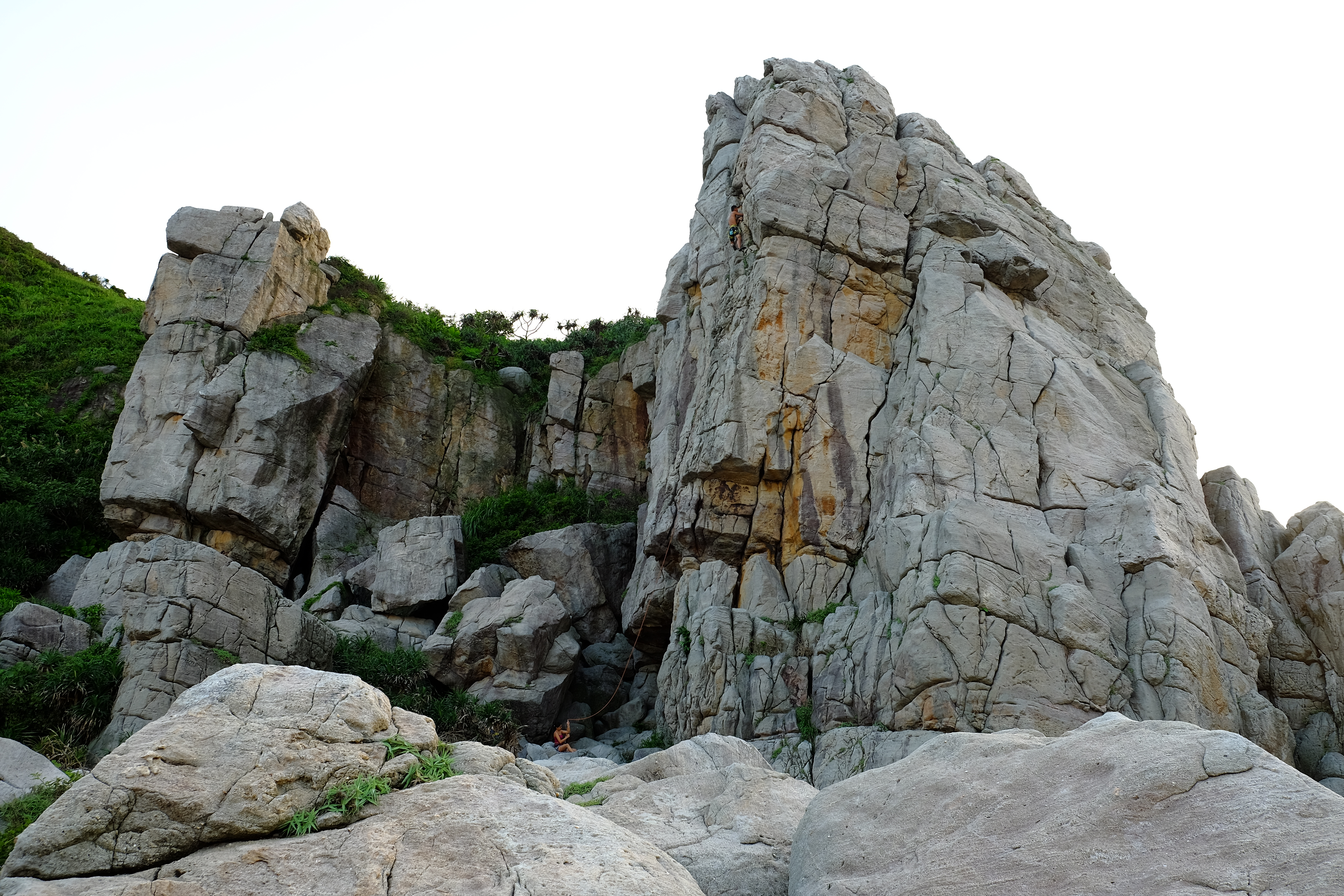 龍洞攀岩場 Longdong